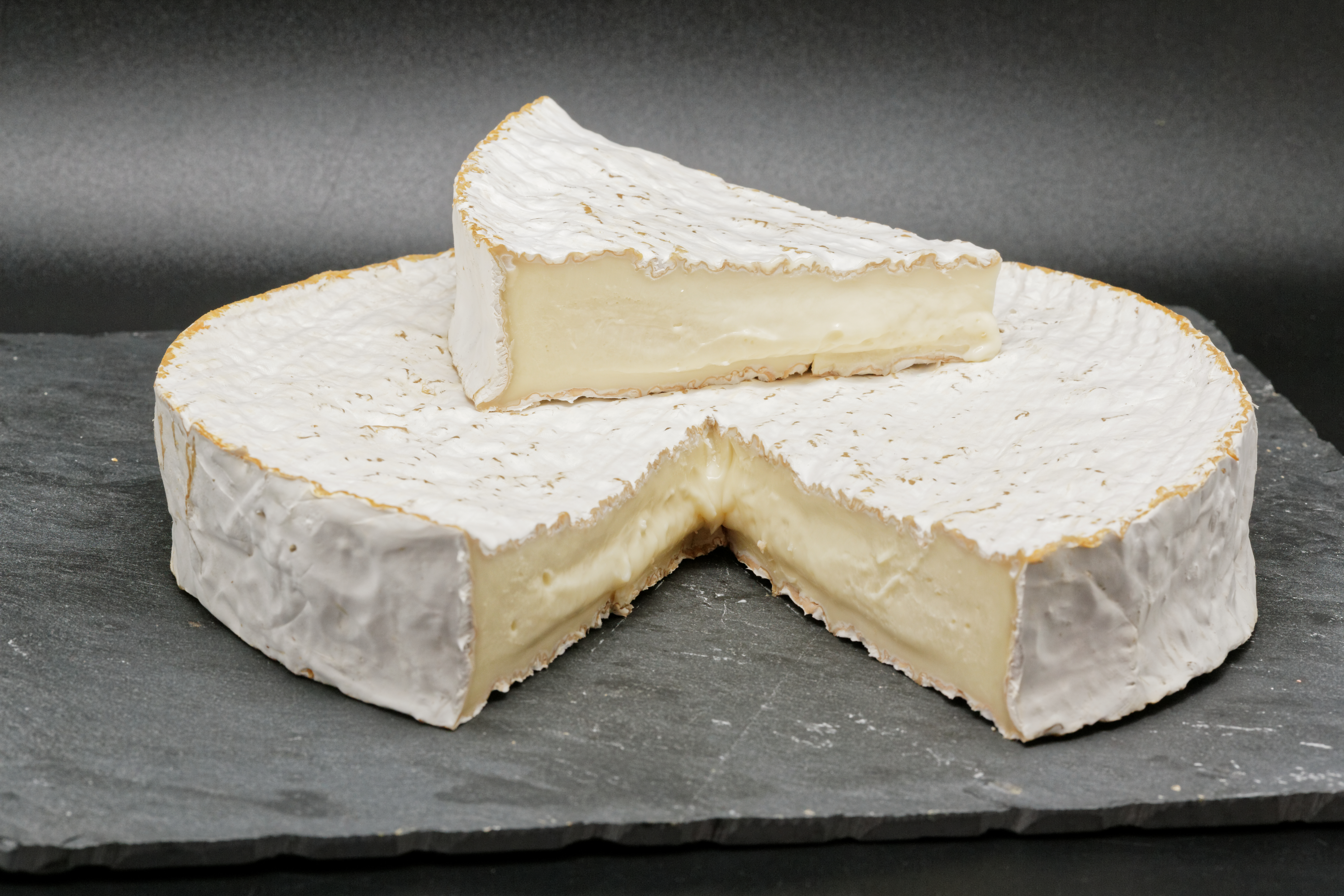 Le brie de Melun est une appellation d'origine désignant un fromage au lait cru de la région de la Brie et de Melun.